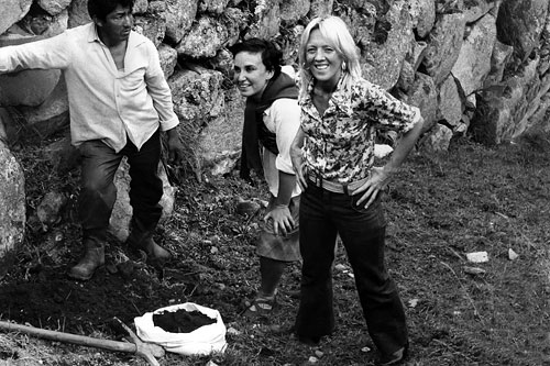 Marta Minujín. Comunicando con tierra (1976-1980)